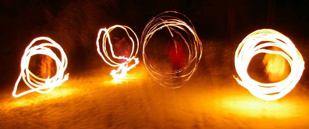 Eldpoi.